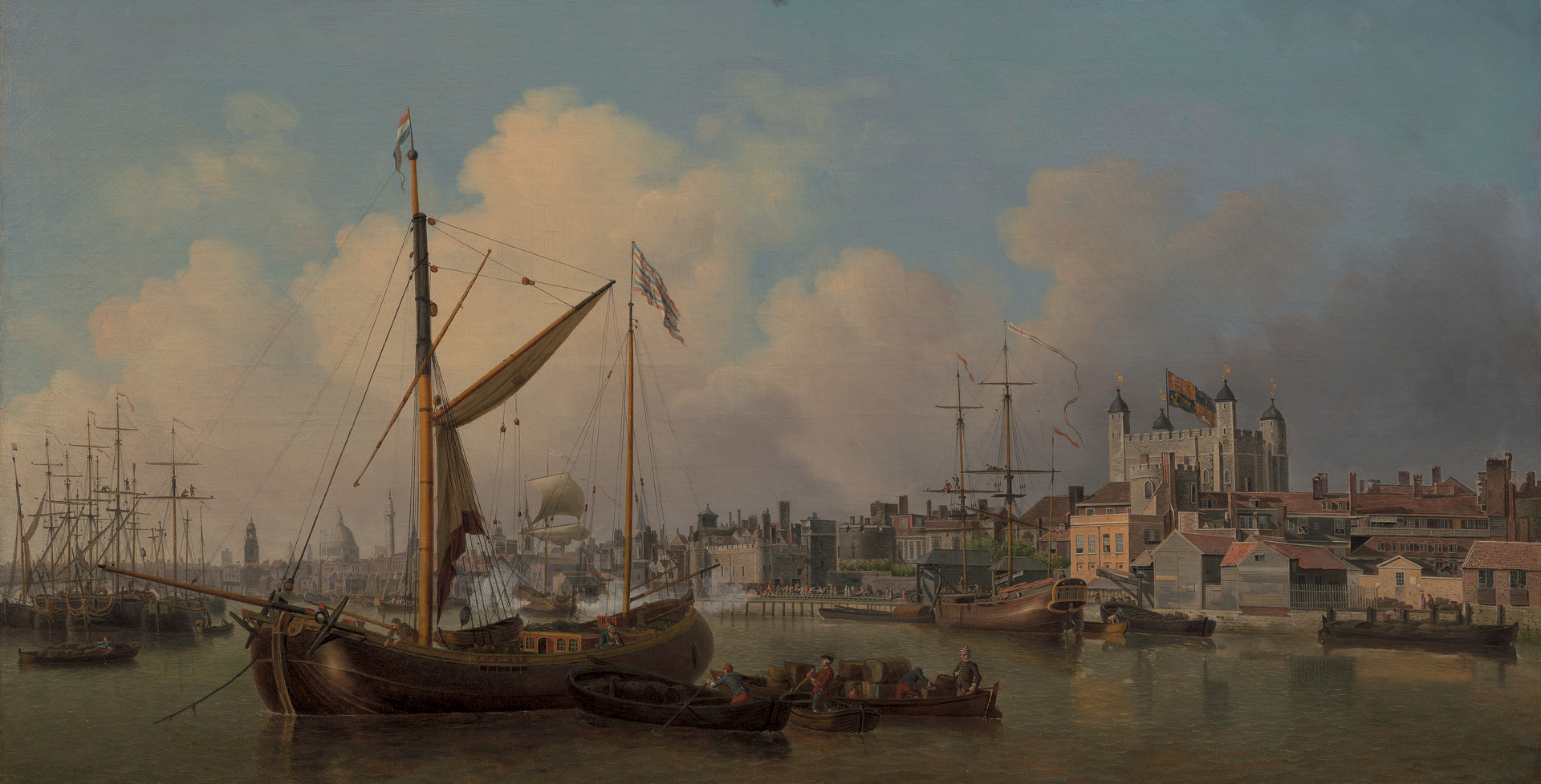 Samuel Scott, Une vue de la tour de Londres, supposé le jour de l’anniversaire de Sa Majesté, YCBA